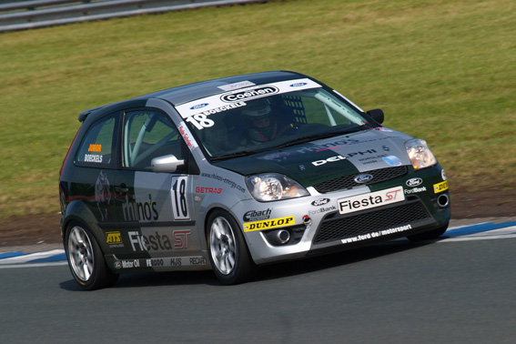 Fiesta Cup